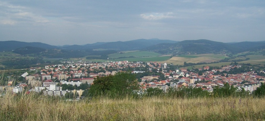 Pohled na Krupinu od Vartovky